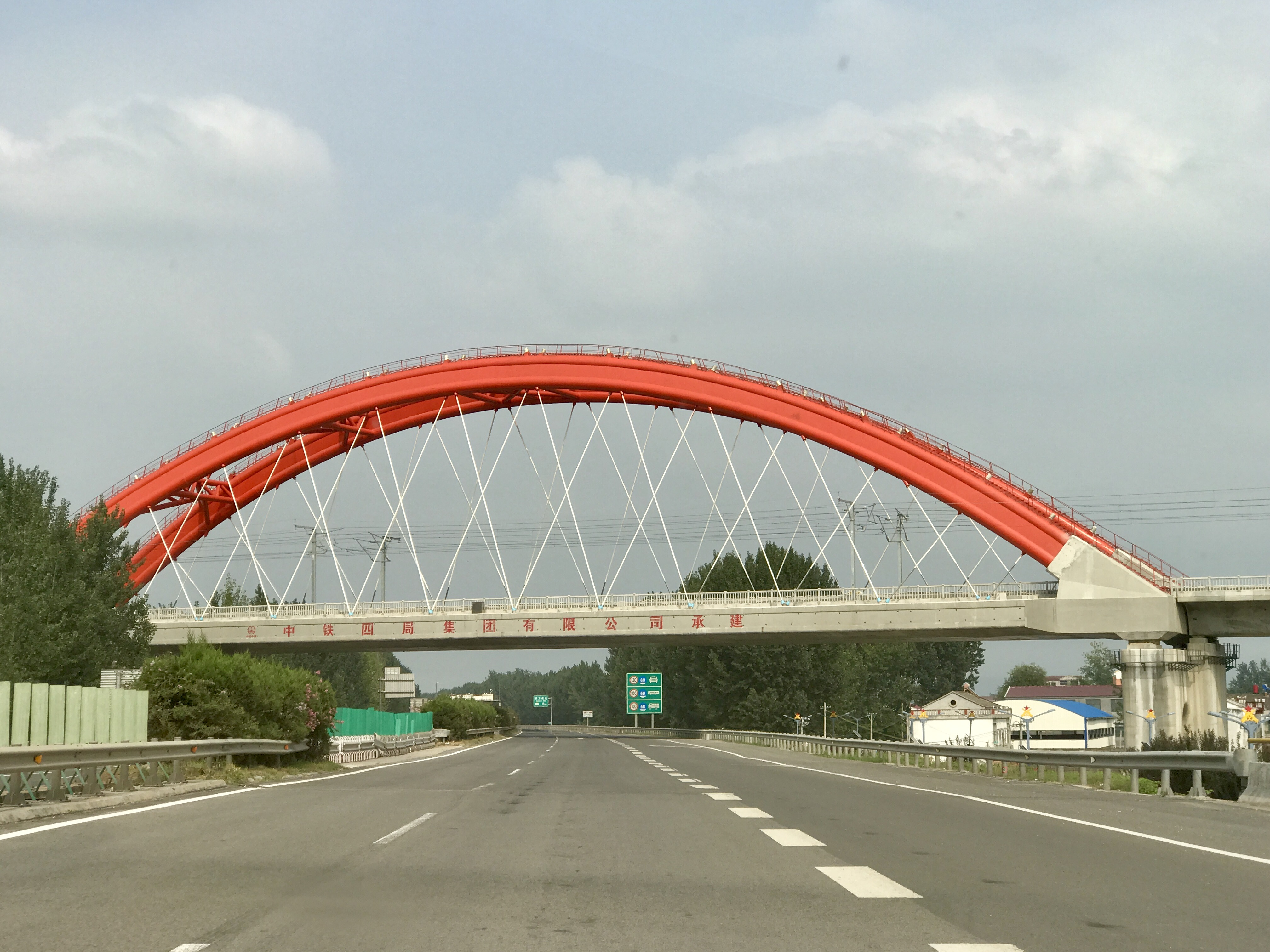 由中铁四局承建的跨连霍高速特大桥